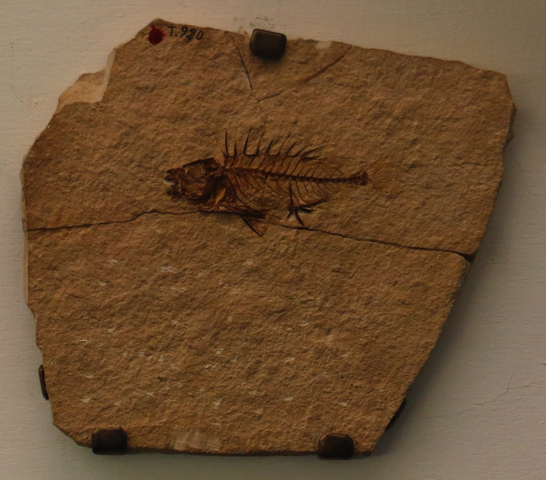 Fossil - Took the picture at Museo di storia naturale di Verona